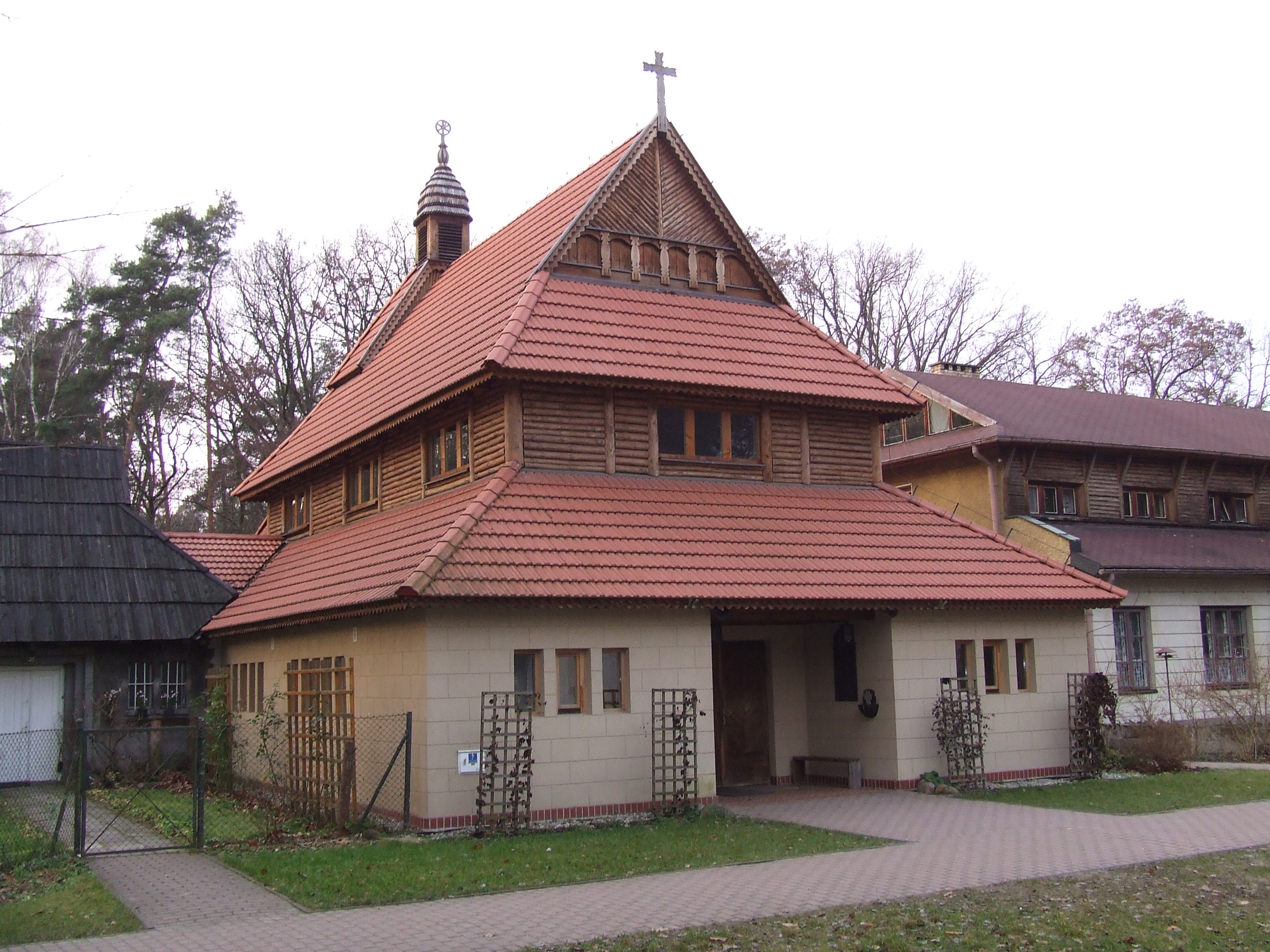 Laski - kaplica pw. Matki Bożej Anielskiej w Zakładzie Dzieci Niewidomych, 1925 wg projektu Łukasza Wolskiego (zabytek nr A-1625)